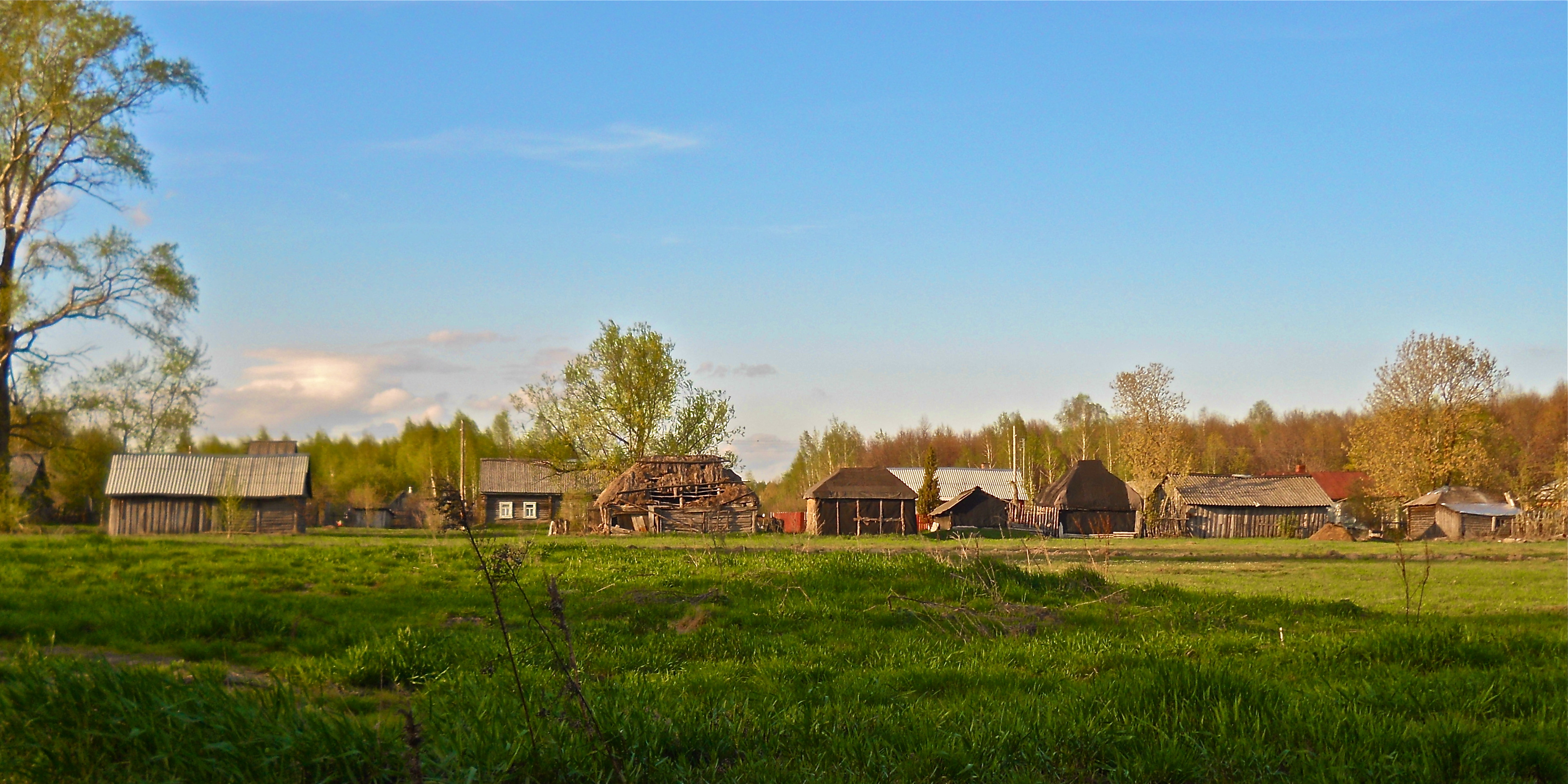 Березовка. Панорама.